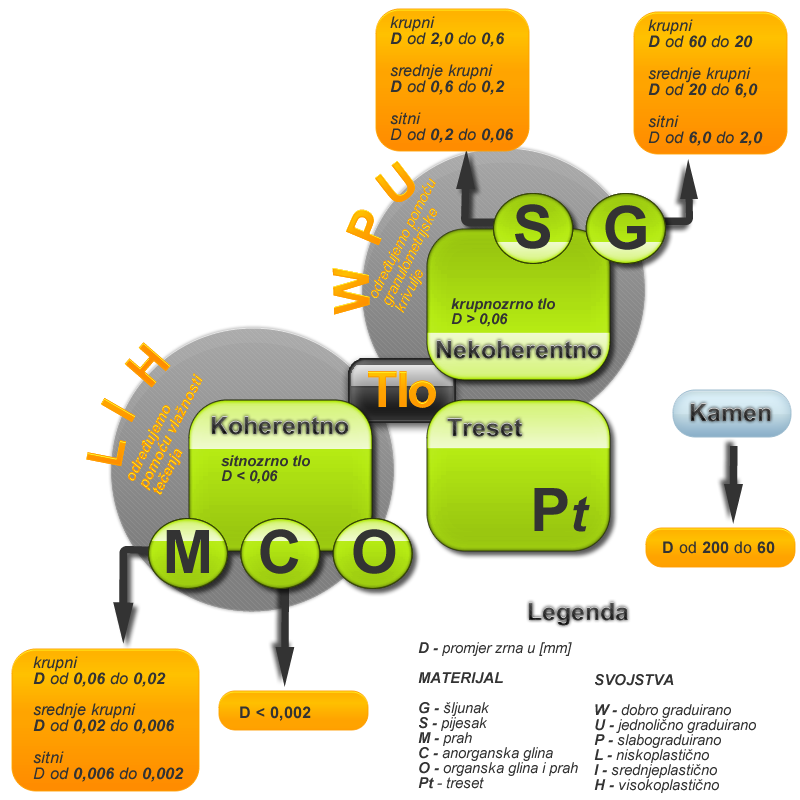 Klasifikacija tla - grafikon